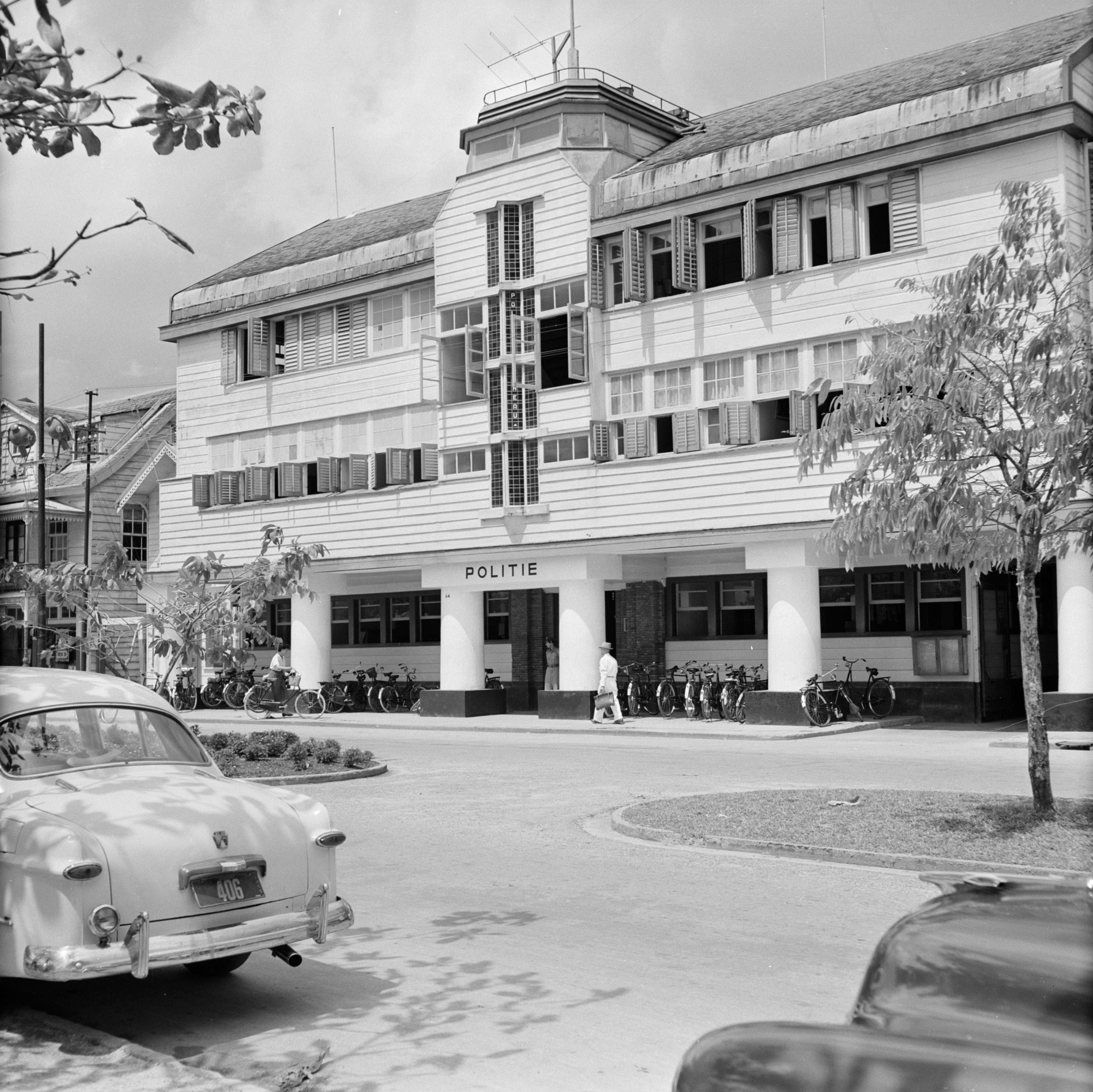 Collectie / Archief : Fotocollectie Van de Poll Reportage / Serie : Nederlandse Antillen en Suriname ten tijde van het koninklijk bezoek van koningin Juliana en prins Bernhard in 1955 Beschrijving : Het Hoofdbureau van politie aan de Waterkant in Paramaribo Datum : 1 oktober 1955 Locatie : Paramaribo, Suriname Trefwoorden : auto's, gebouwen, politie, straatbeelden Persoonsnaam : waterkant Fotograaf : Poll, Willem van de Auteursrechthebbende : Nationaal Archief Materiaalsoort : Negatief (zwart/wit) Nummer archiefinventaris : bekijk toegang 2.24.14.02 Bestanddeelnummer : 252-4950